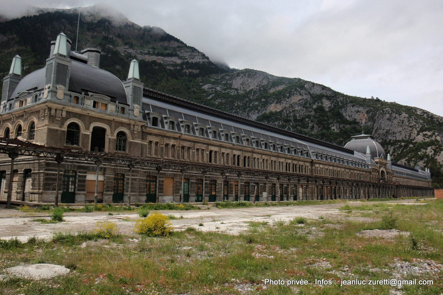 Quai français 2